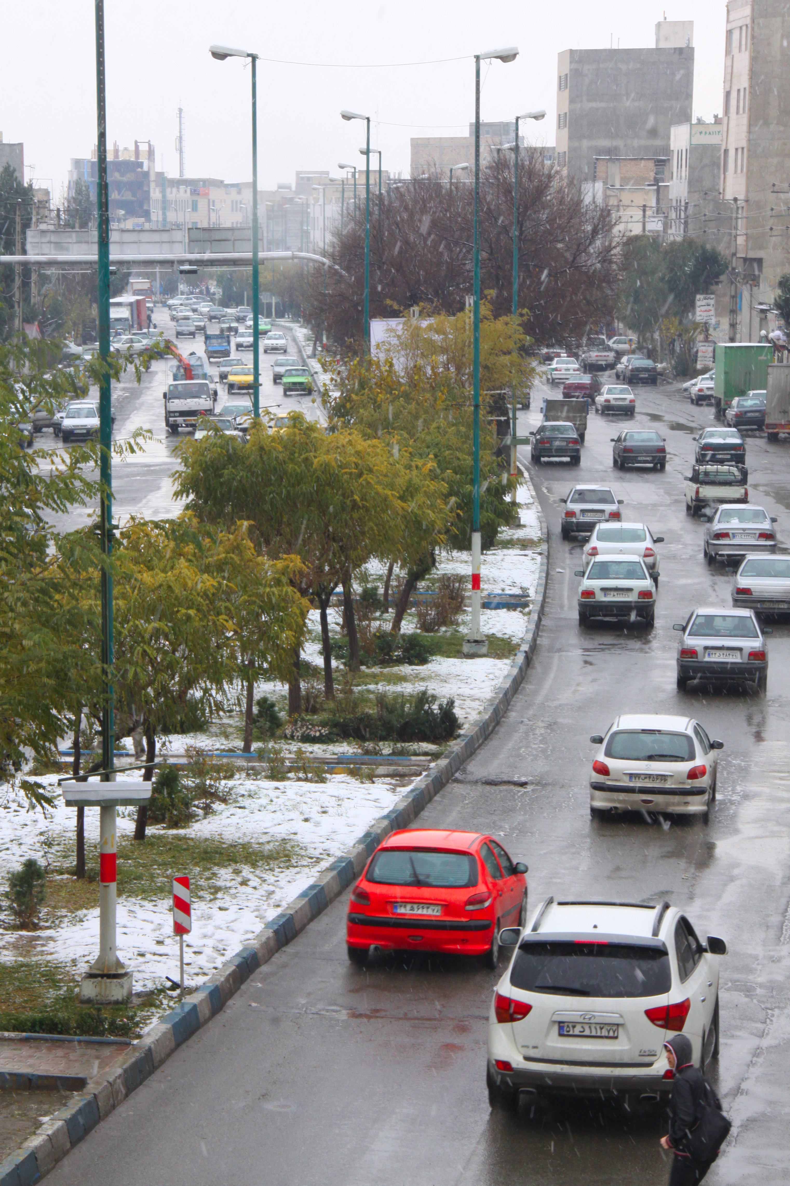 Ghods City / Tehran / Iran / Photo by: Alireza Habibi